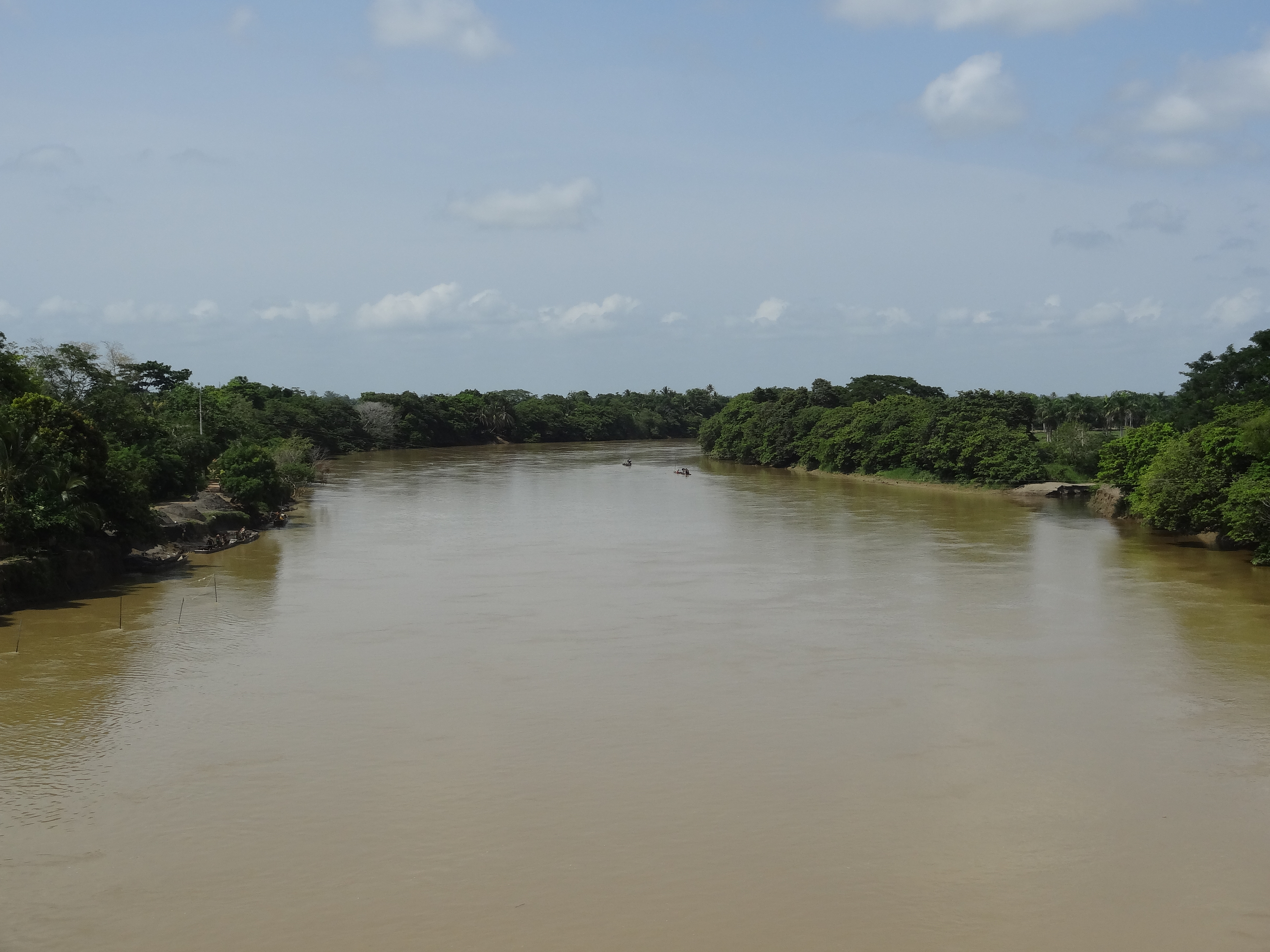 RIO SINU A LA ALTURA DEL CORREGIMIENTO EL CAÑO